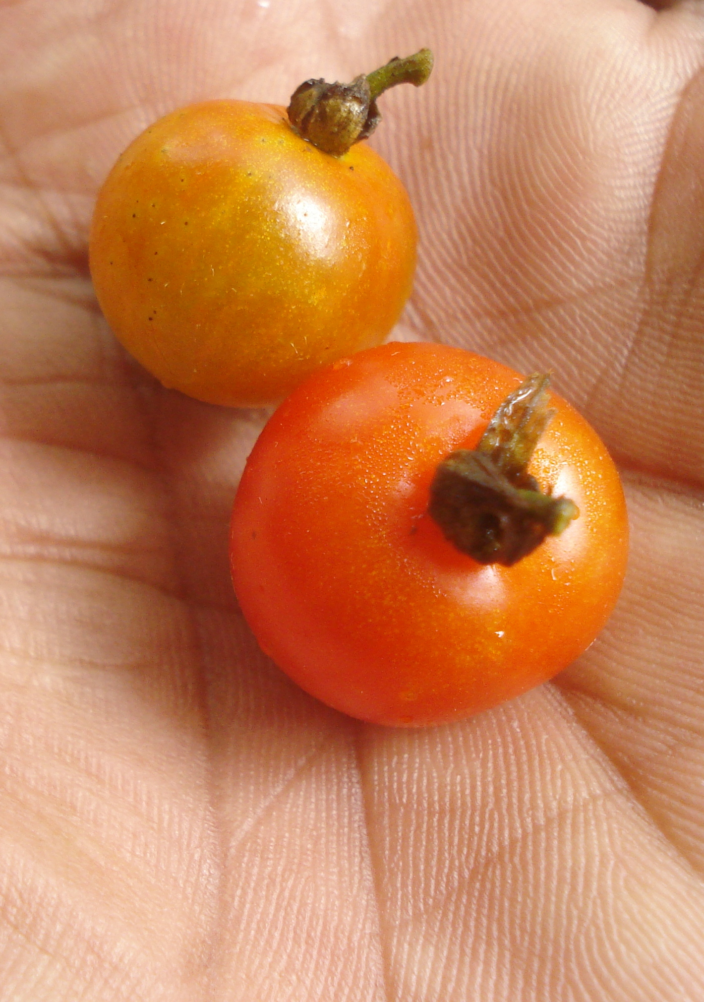 പീരുമേട്ടിൽ പലയിടത്തും കണ്ടു വരുന്ന ഒരിനം തക്കാളി. കുട്ടിത്തക്കാളി എന്നറിയപ്പെടുന്ന ഇത് ഏറെ ഗുണമുള്ളതാണെങ്കിലും തീരെ വലുപ്പം കുറവായതിനാലാകാം വ്യാപകമായി കൃഷി ചെയ്യപ്പെടുന്നില്ല.